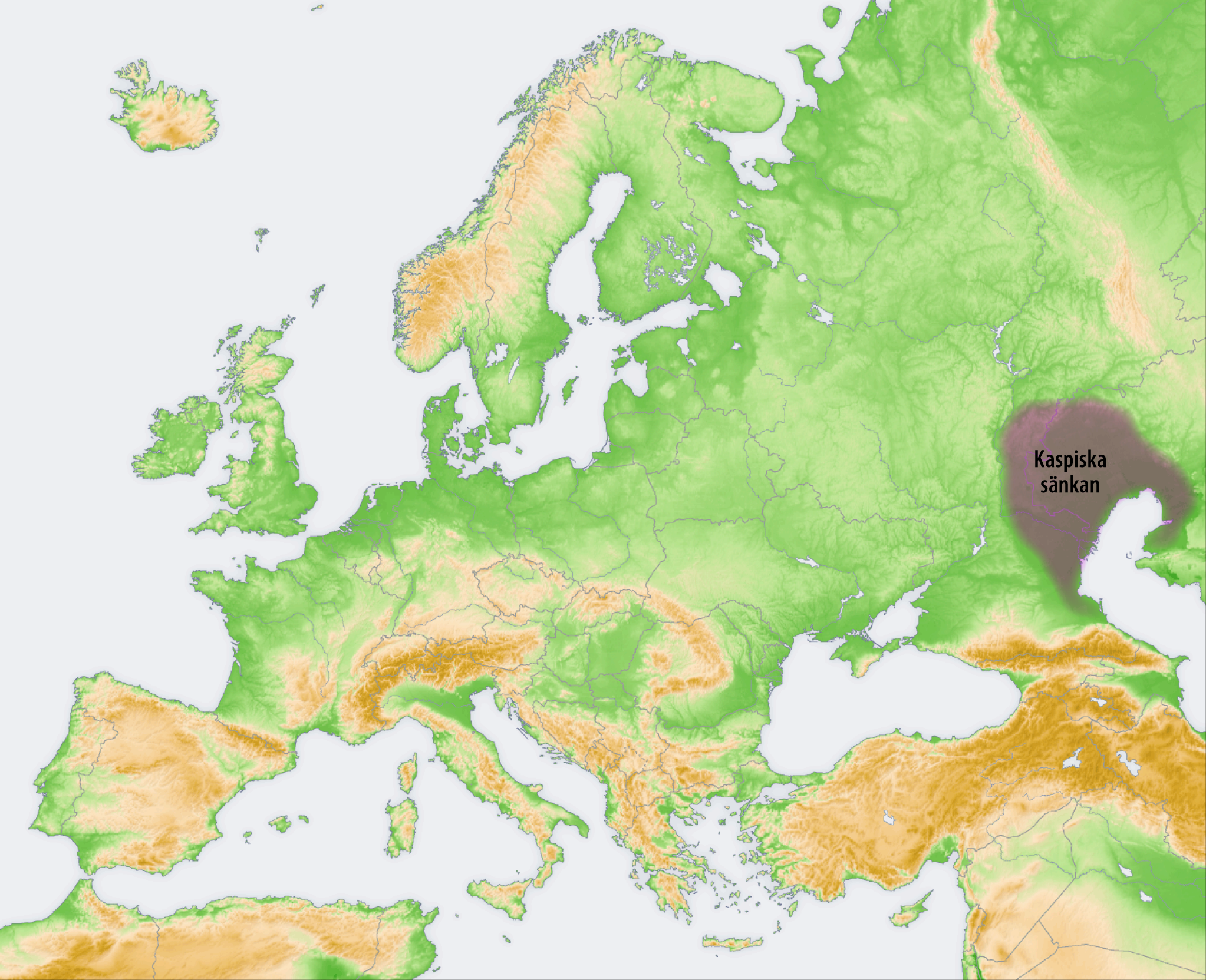 Landschaften der Osteuropäischen Ebene: Kaspische Senke